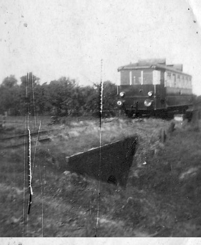 DWK-Triebwagen Typ IV, Baujahr 1926, der Butjadinger Bahn. Der Triebwagen ist heute - allerdings nicht betriebsbereit - noch vorhanden